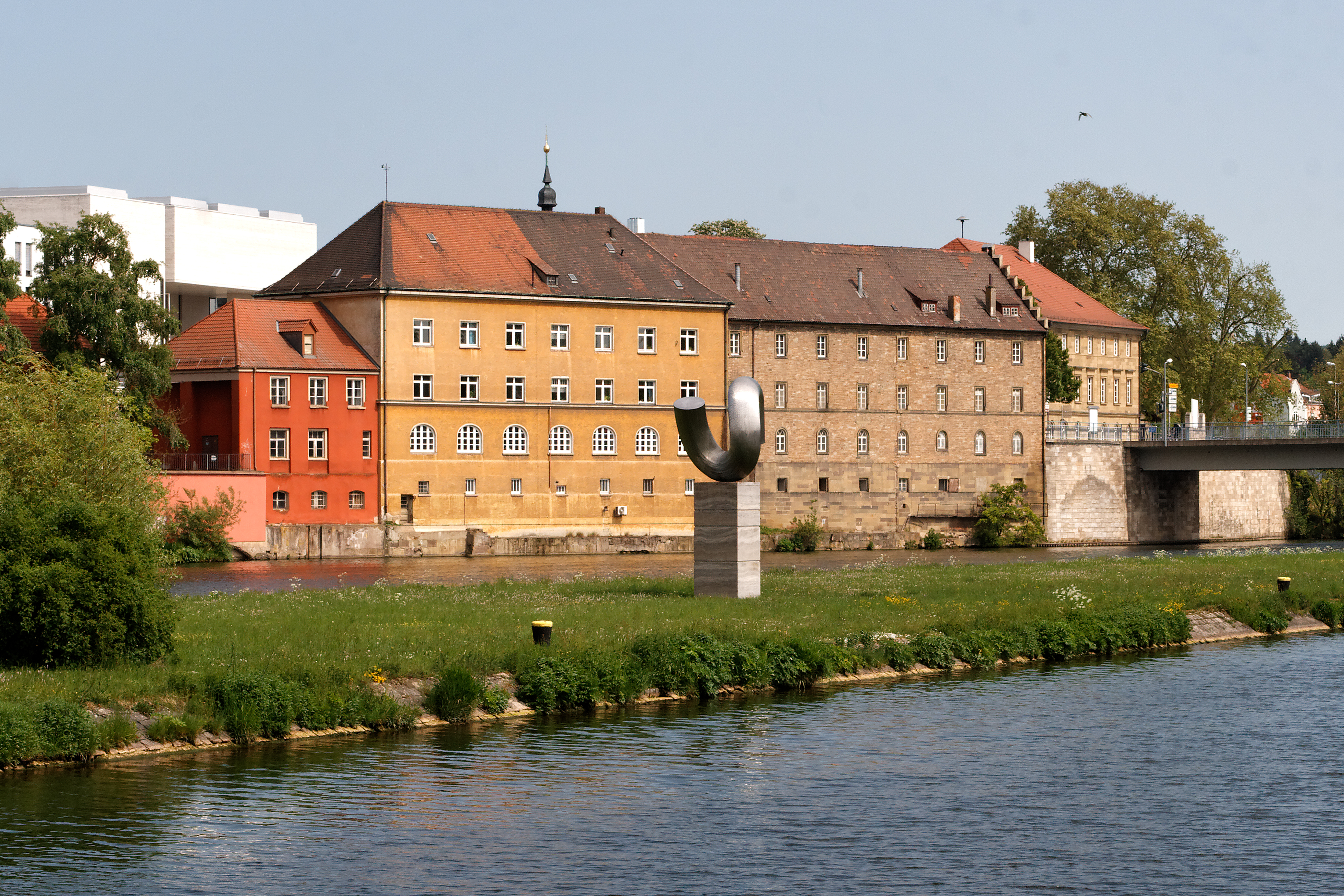 Ehemalige Spinnmühle in Schweinfurt, heute vom Stadtverband Musik und als Kulturwerkstatt genutzt. Laut Gedenktafel befanden sich seit dem 14. Jahrhundert Mühlen an diesem Standort. Auf der Schleuseninsel im Vordergrund steht die Skulptur Anker von Brigitte und Martin Matschinsky-Denninghoff von 1986/87. Rechts, hinter der Brücke, ist das Harmonie-Gebäude zu erkennen.